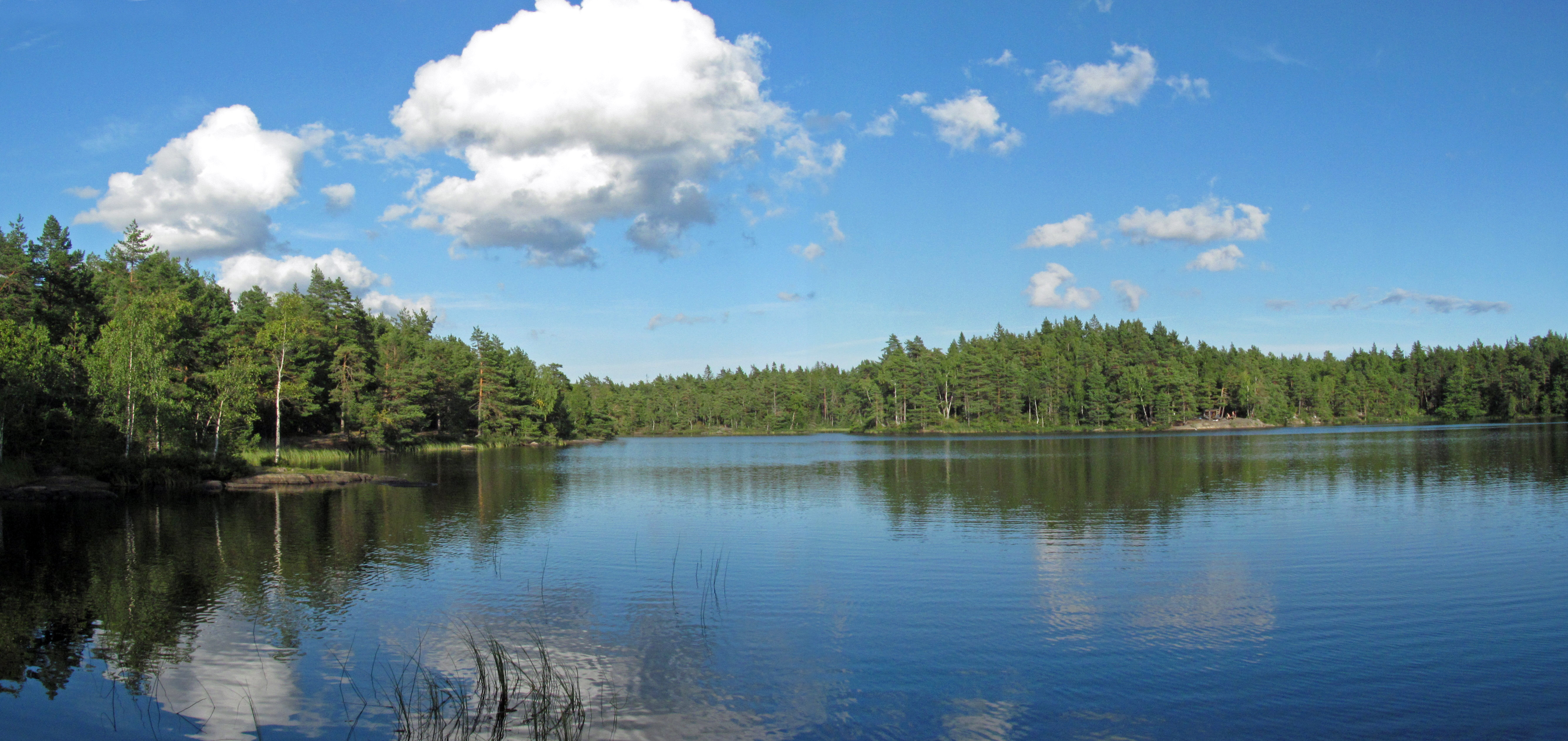 Trehörningen, Hanveden